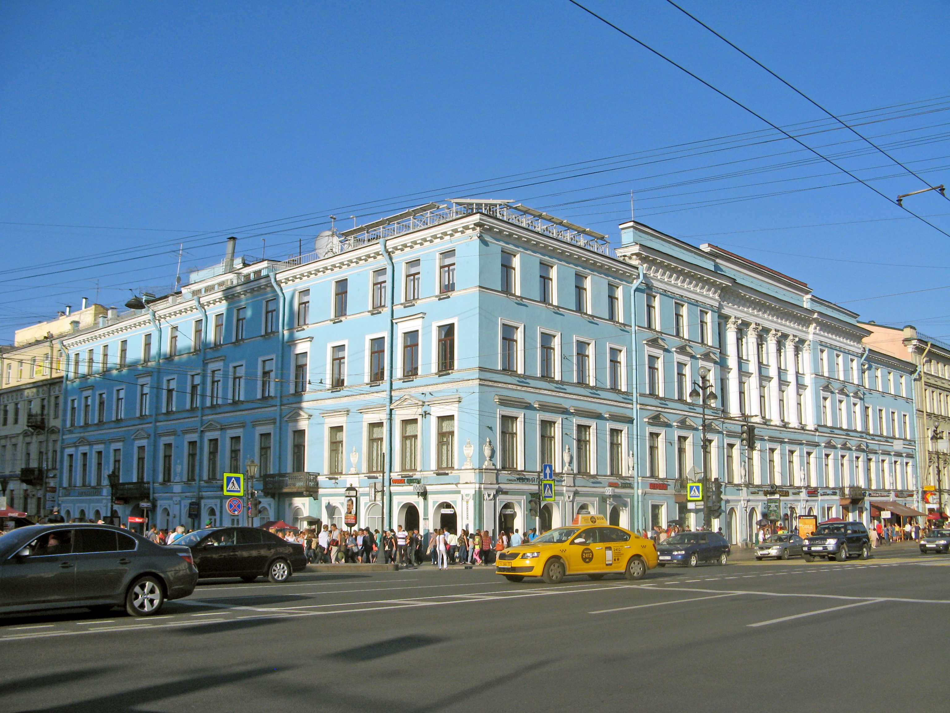 Дом Энгельгардта: набережная канала Грибоедова, 16, Невский проспект, 30, Центральный район, Санкт-Петербург